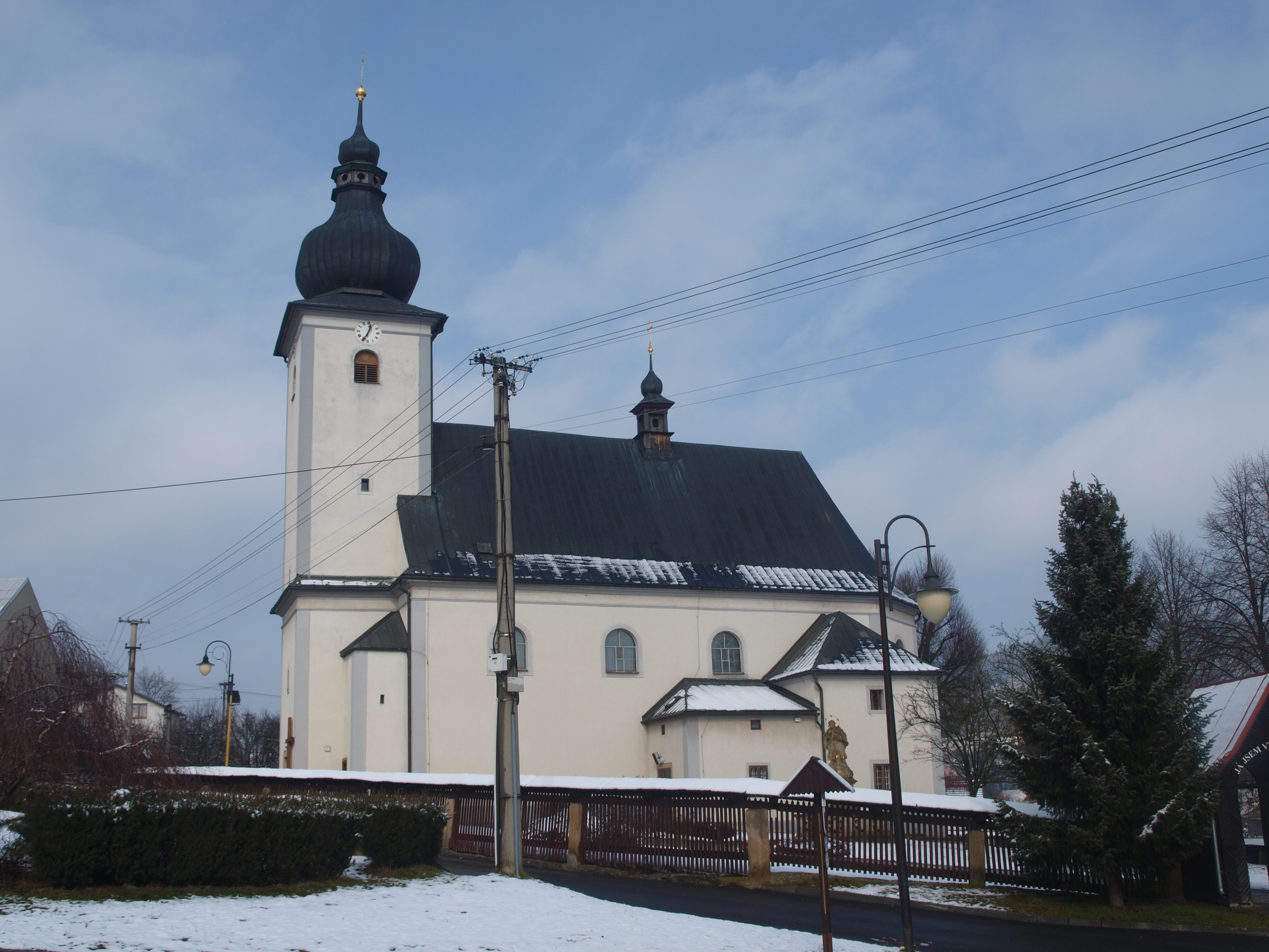 Kostel svaté Kateřiny Sinajské v Lidečku